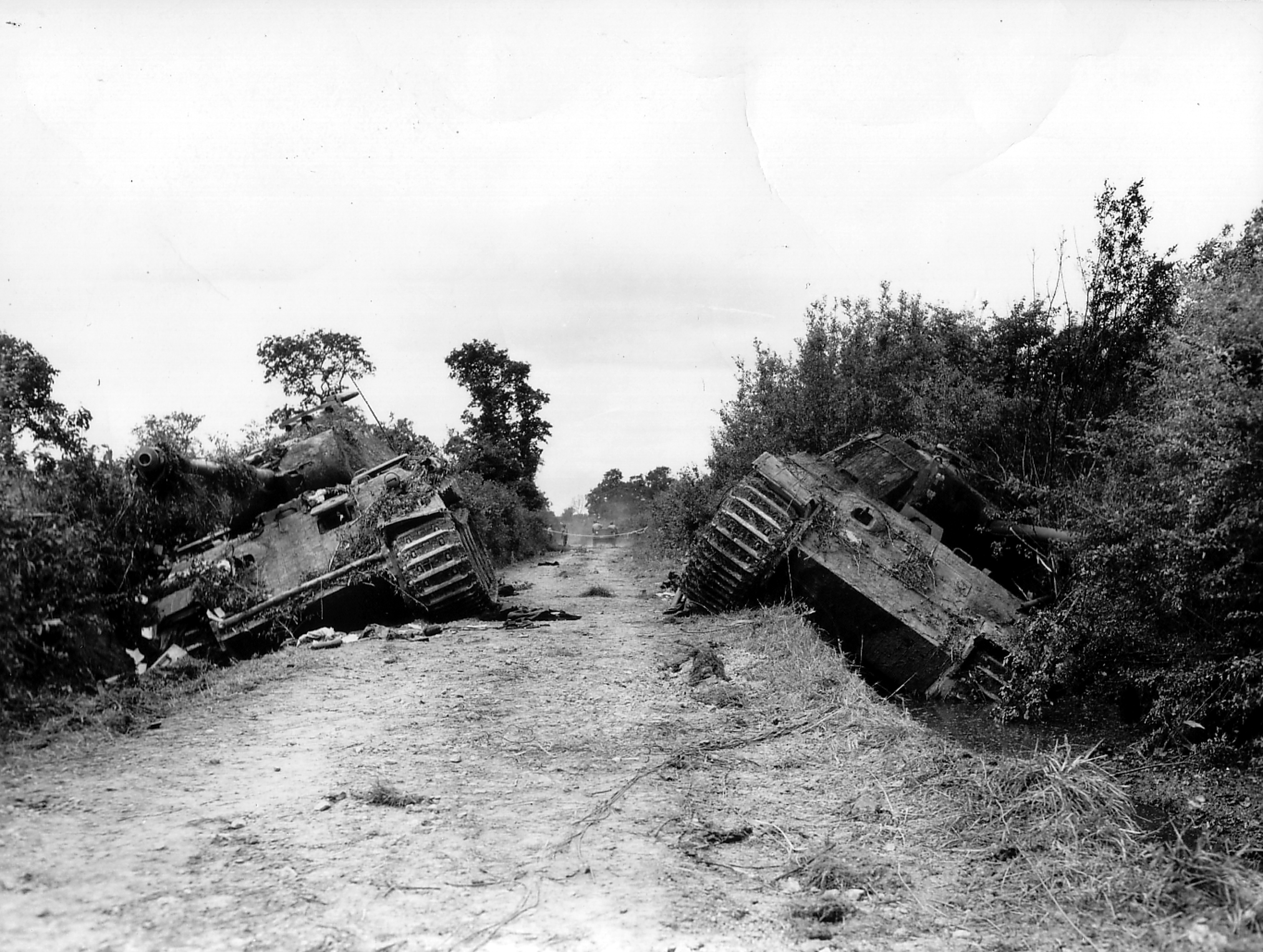 Deux Panzer V détruits sur le bord de la route appartenant à la première compagnie du Panzer Lehr Regiment 130.